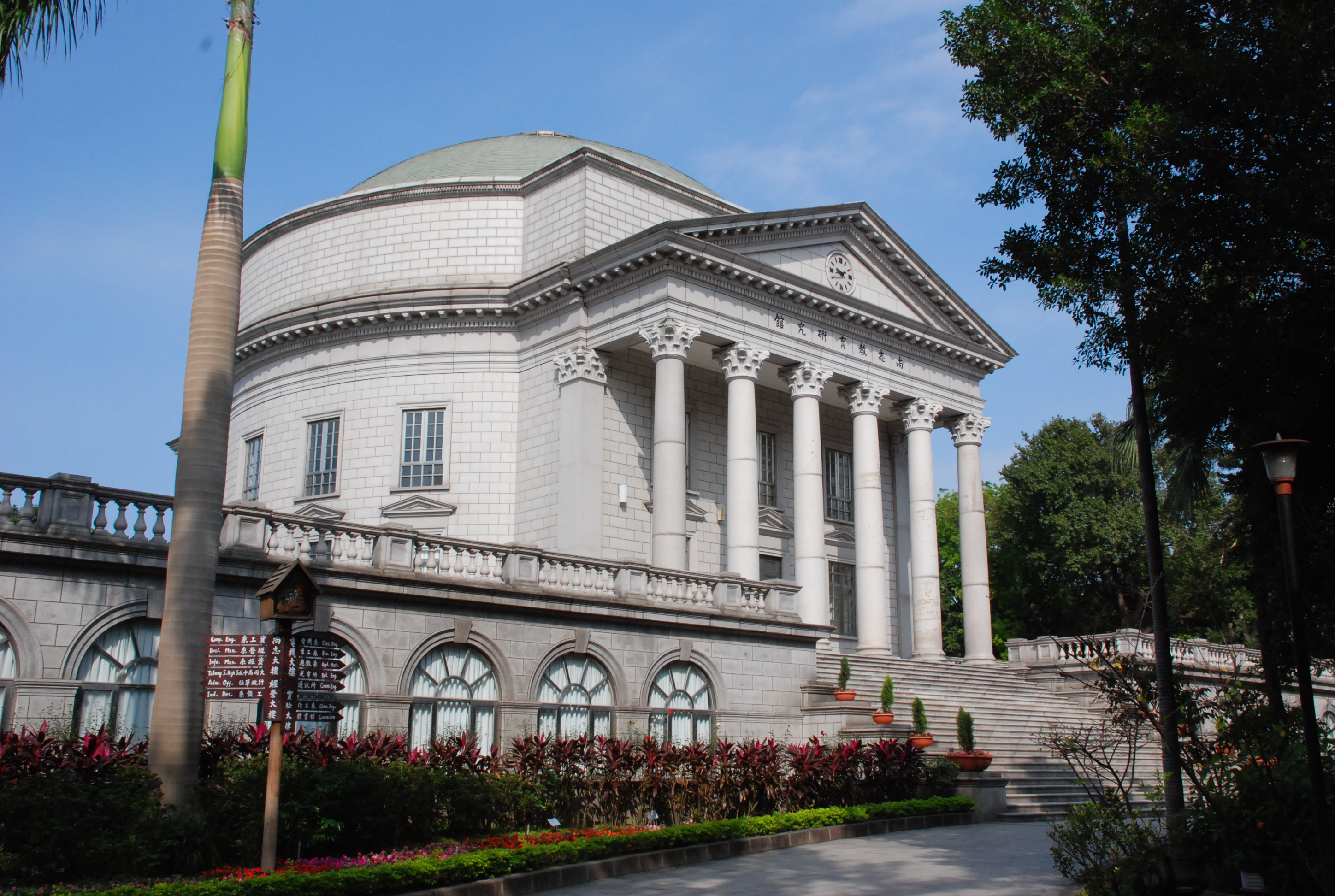 中文（台灣）: 大同大學尚志教育研究館左前方外觀。